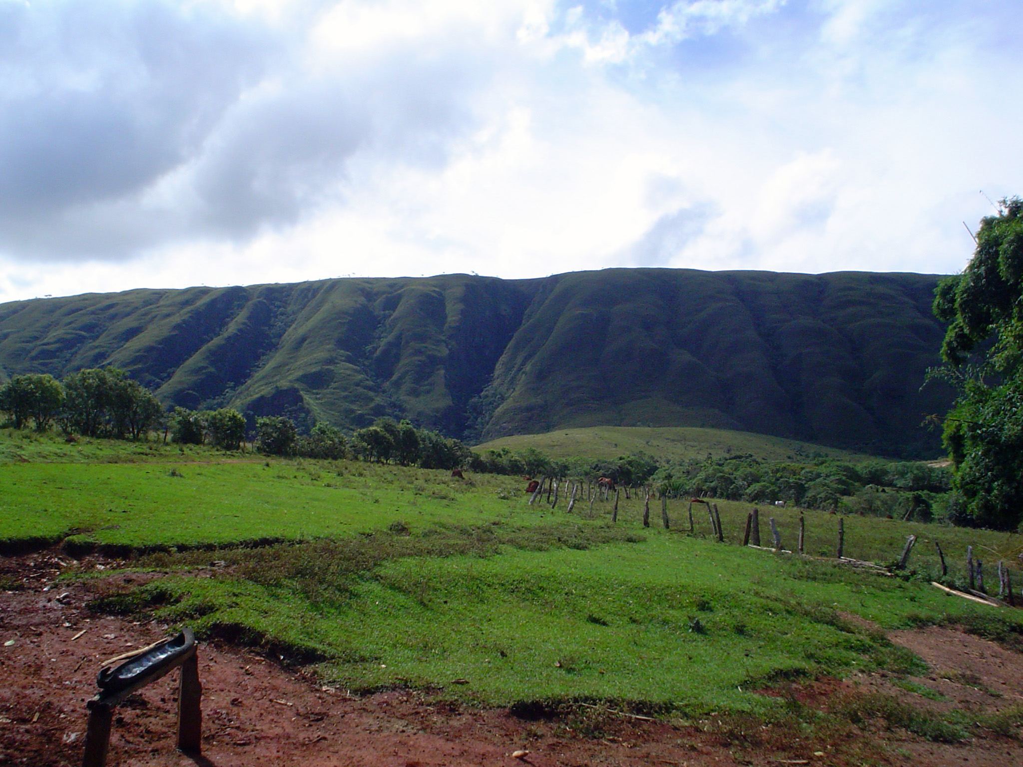 Parque Nacional da Serra da CanastraAs Serras da Canastra